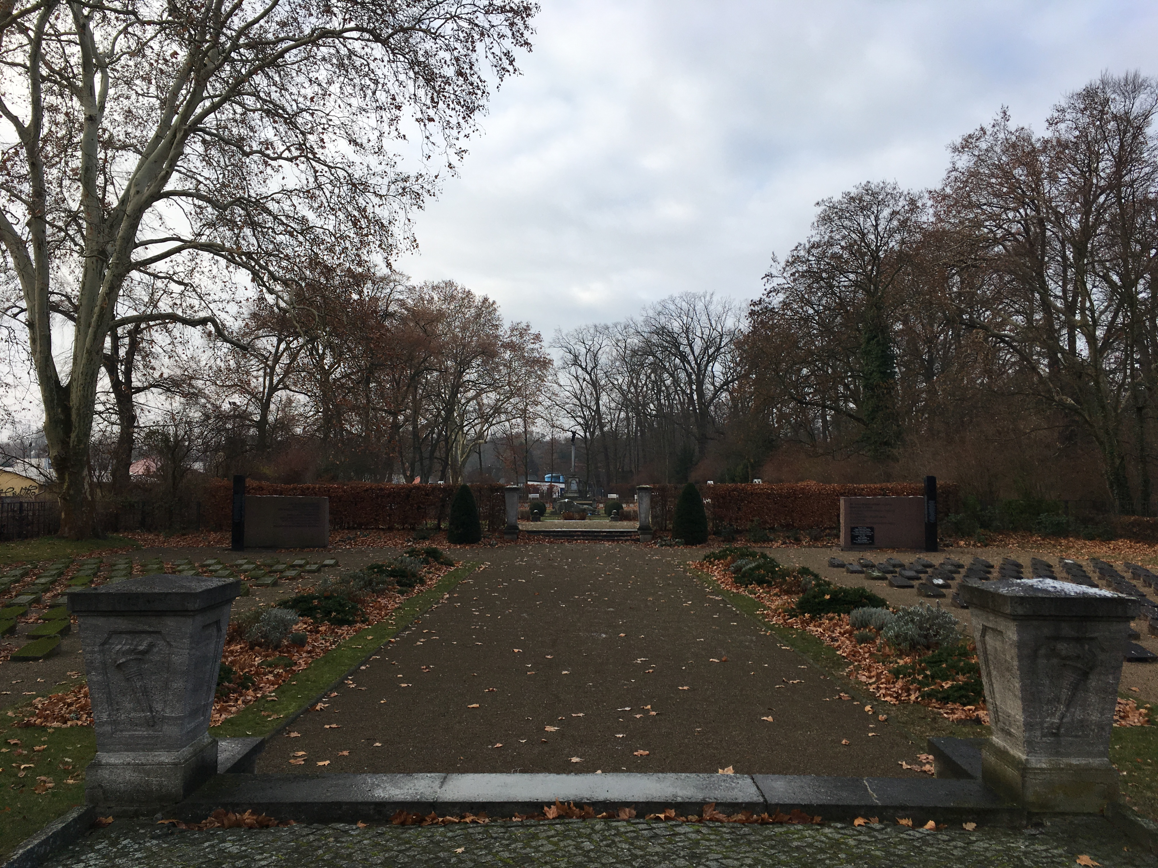 Der Stadtpark Treuenbrietzen ist eine denkmalgeschützte Grünanlage in Treuenbrietzen, Landkreis Potsdam-Mittelmark in Brandenburg. Er umfasst unter anderem einen Ehrenhain für Opfer aus dem Deutsch-Französischen-Krieg sowie aus den beiden Weltkriegen.